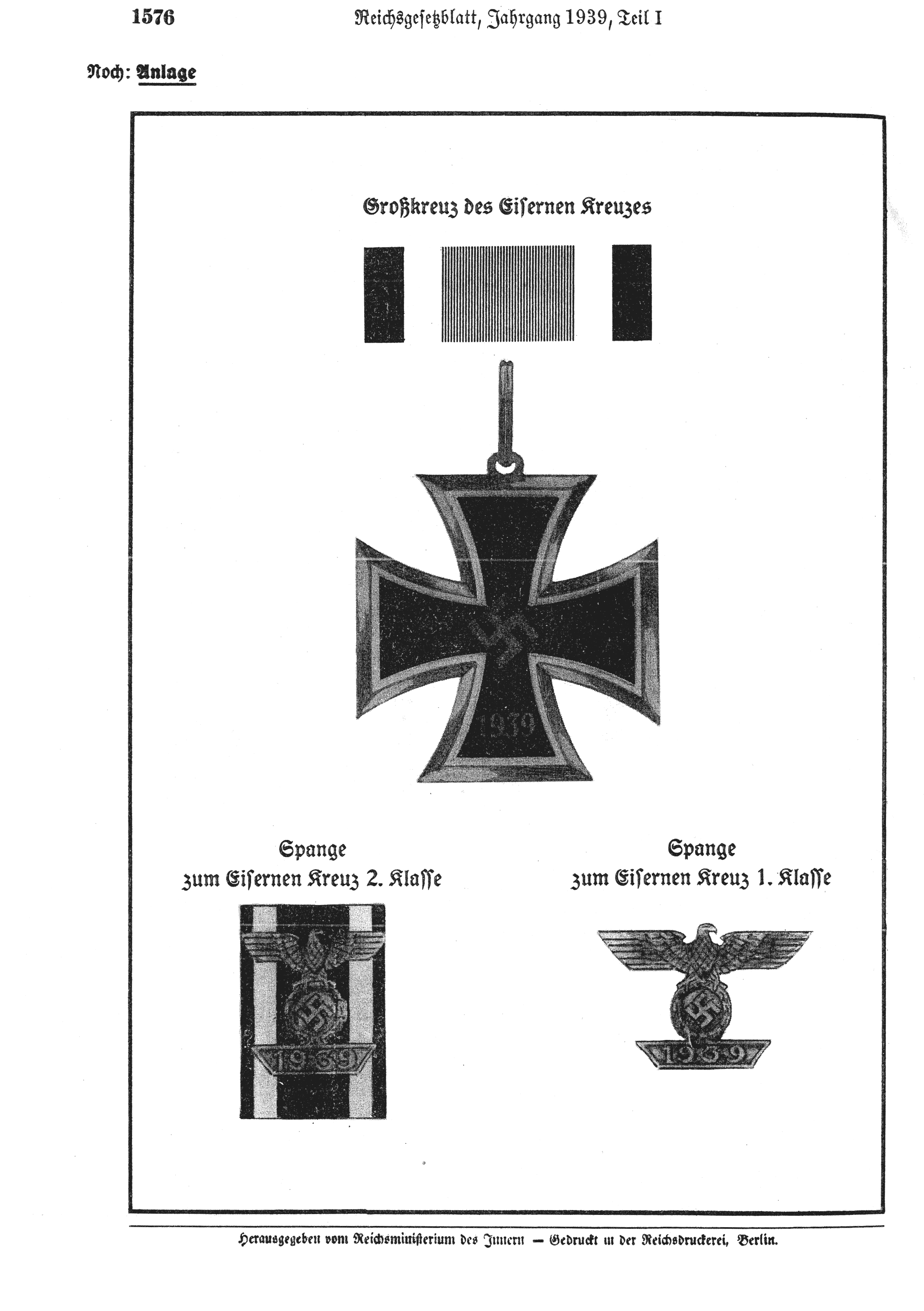 Abbildungen zur Stiftung des Eisernen Kreuzes 1939 (Großkreuz und Wiederholungsspangen)